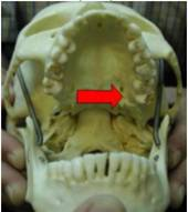 Cordal vestibulizado, +8